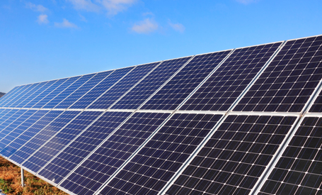 Placas solares.